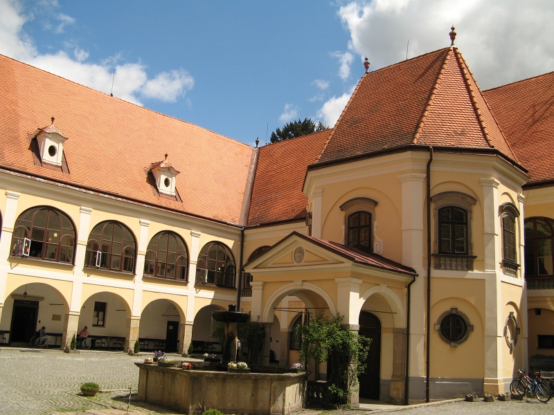 Zámek Budíškovice, Budíškovice 1, Budíškovice.